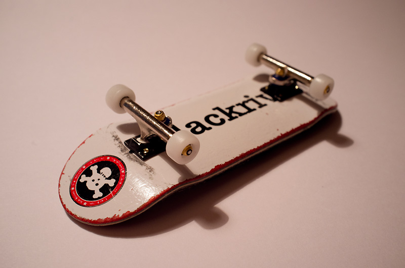 Beispiel eines professionellen Fingerboards